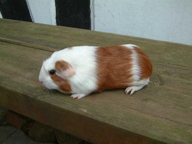 Cuy (große, schnellwüchsige Form der Hausmeerschweinchen, Cavia porcellus) in einem Alter von 6 Wochen.